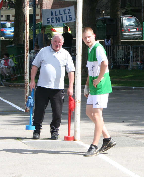 Les chasses rouge et bleu - Jeu de Ballon au poing